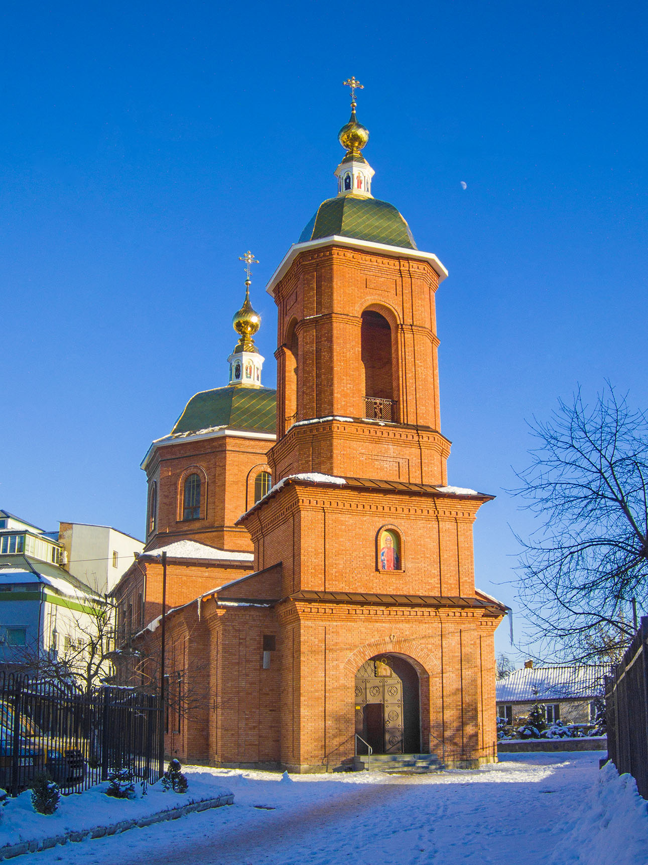 Православна автокефальна церква Володимира Великого (єдиновірська Покровська церква), Кропивницький, вул. А. Тарковського (Володарського), 73/5 (ріг Покровської)